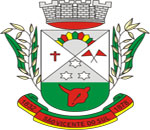 Brasão de Armas do município gaúcho de São Vicente do Sul, Brasil.